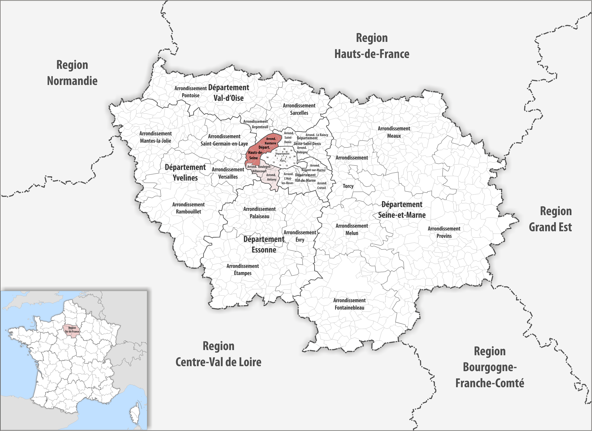 Lage des Arrondissements Nanterre